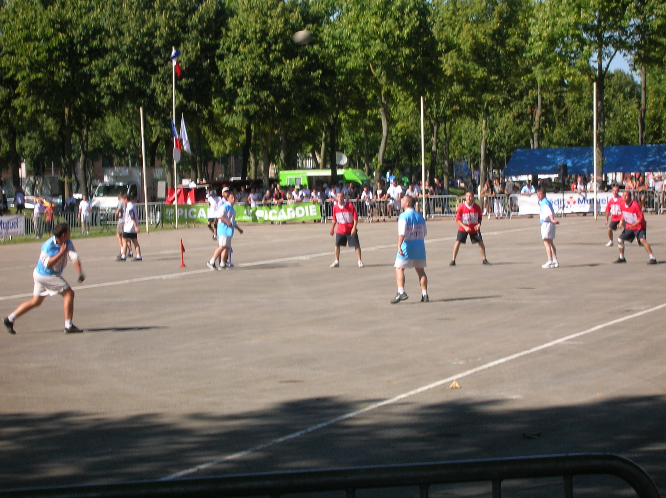 championnat de France de Ballon au poing - 2009 - parc de la Hotoie (Amiens)Picard: campionnat d' Franche éd Balon au poing - 2009 - parc éd la Hotoie (Anmien)